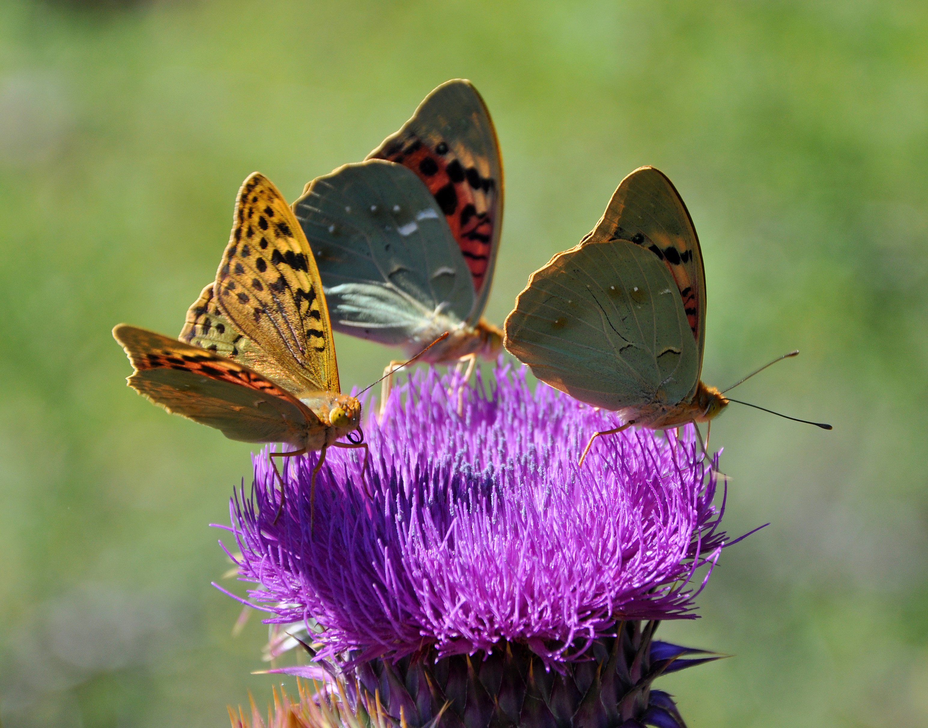 Argynnis pandora